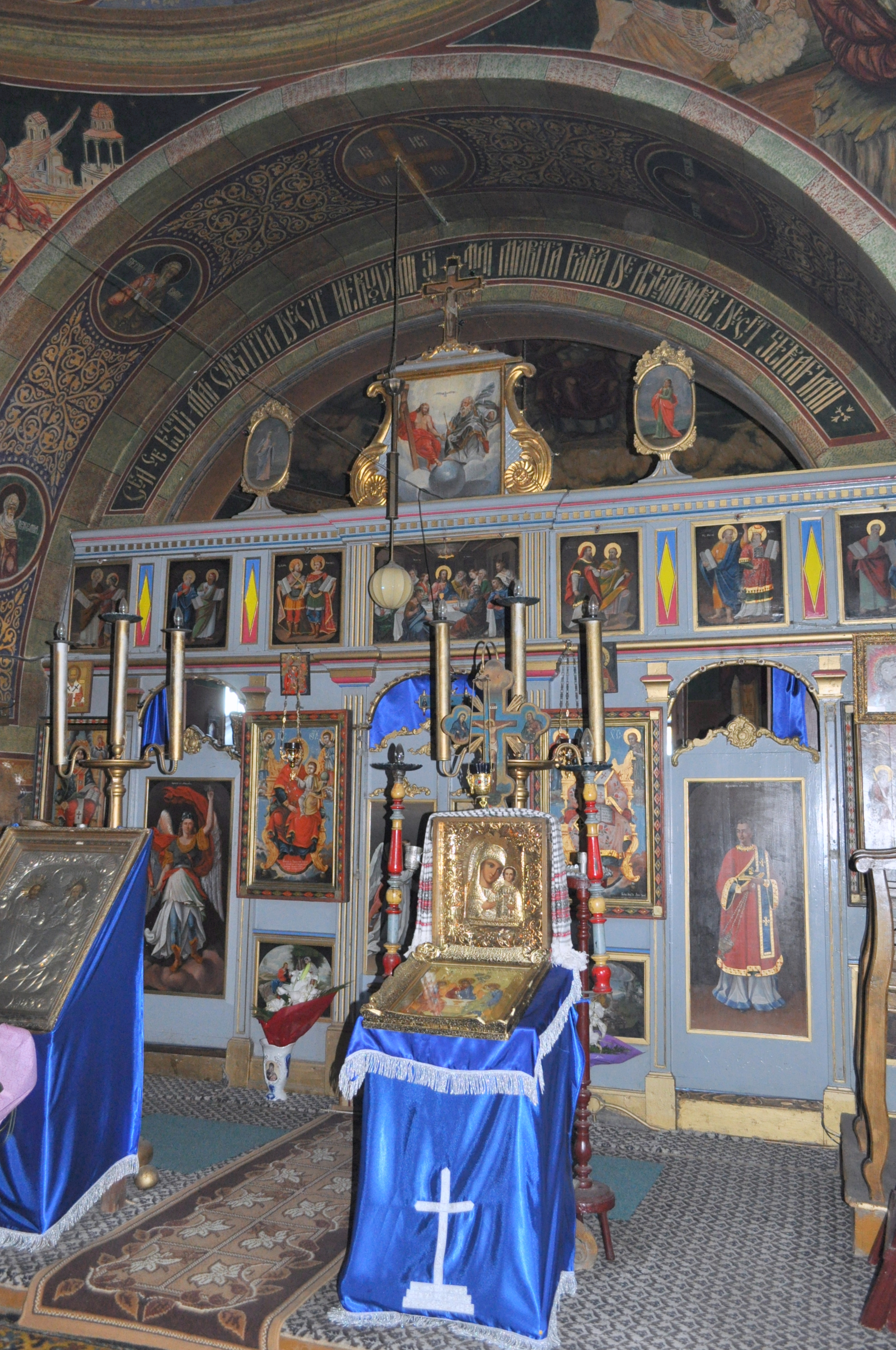 Biserica ortodoxă „Sfânta Treime”